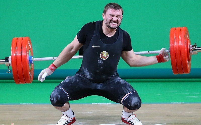 وزنه‌برداری در بازی‌های المپیک تابستانی ۲۰۱۶ – ۹۴ کیلوگرم مردان